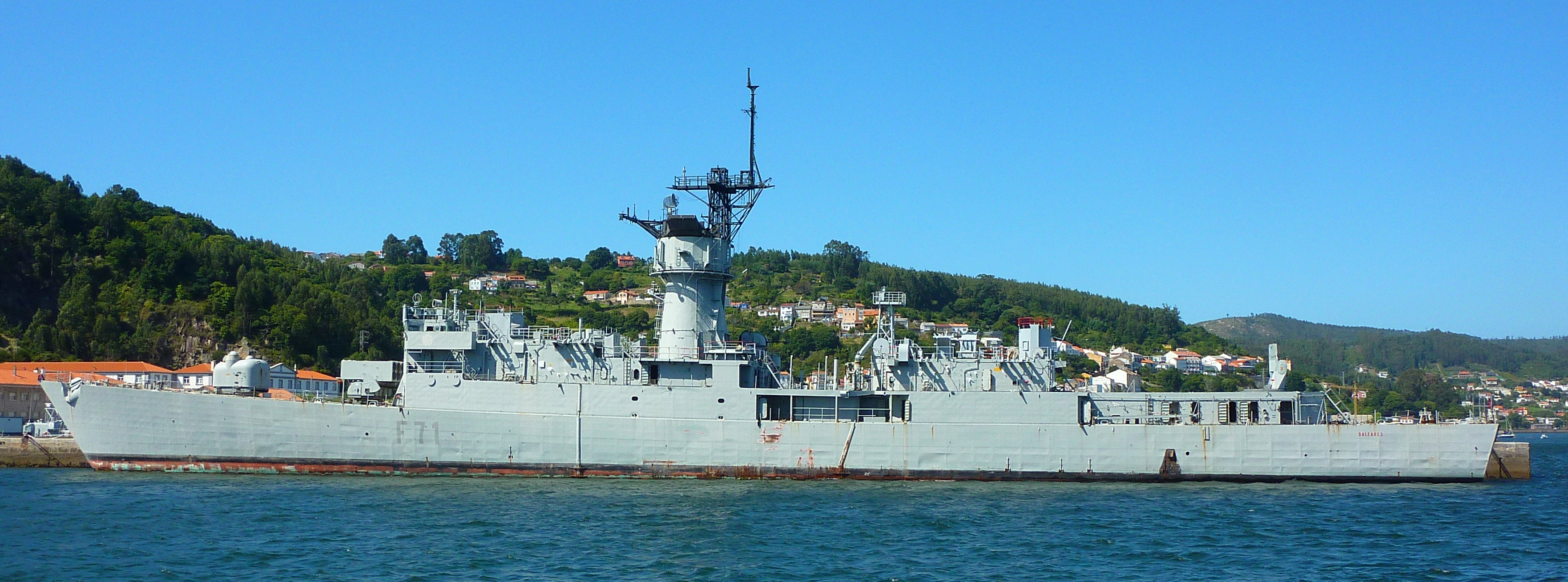 Fragata de la Armada Española clase Baleares "Baleares".